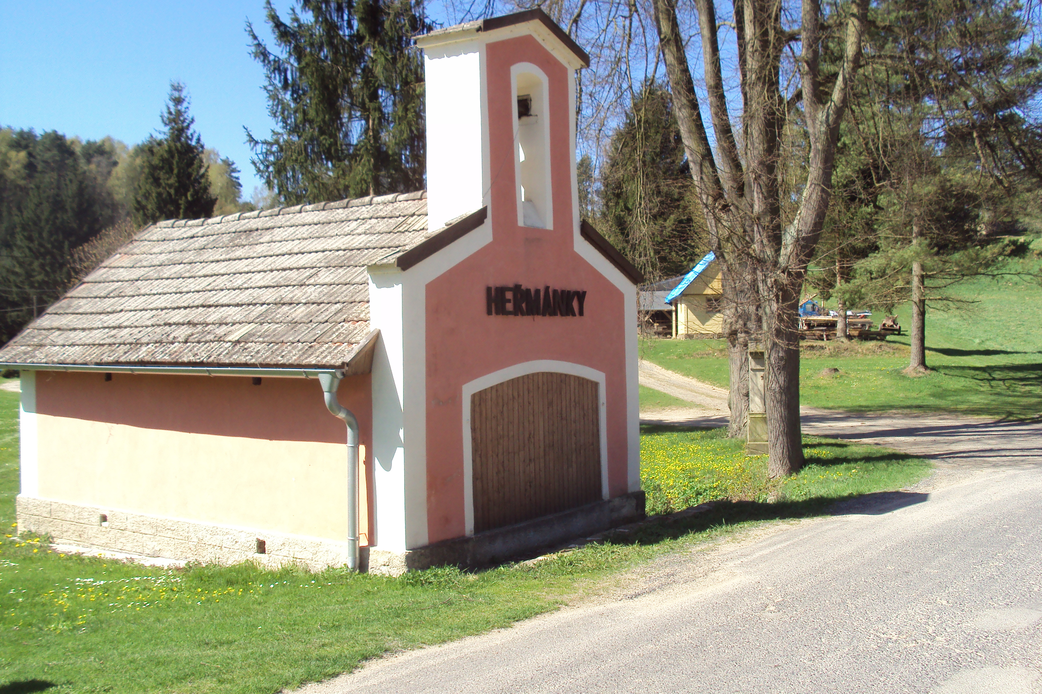 Snad požární zbrojnice, obec Heřmánky severně od Dřevčice